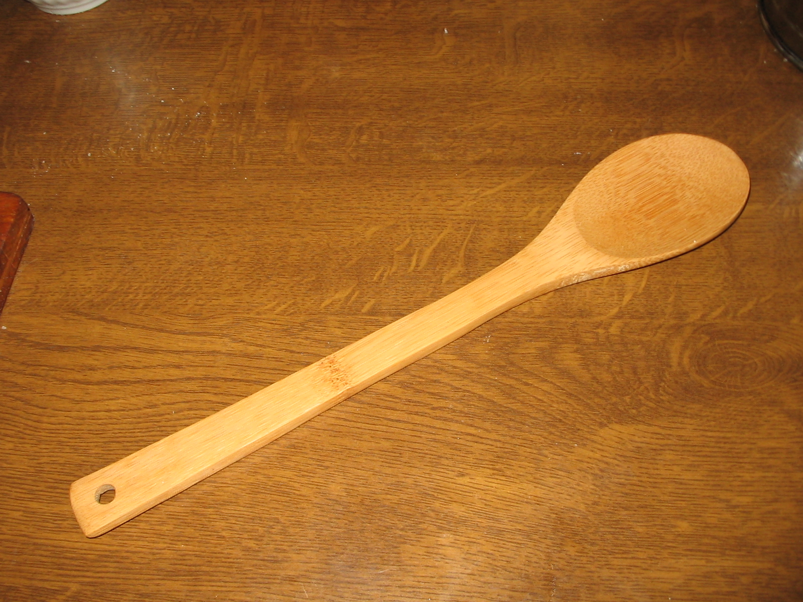 Кухонне начиння. Копистка.